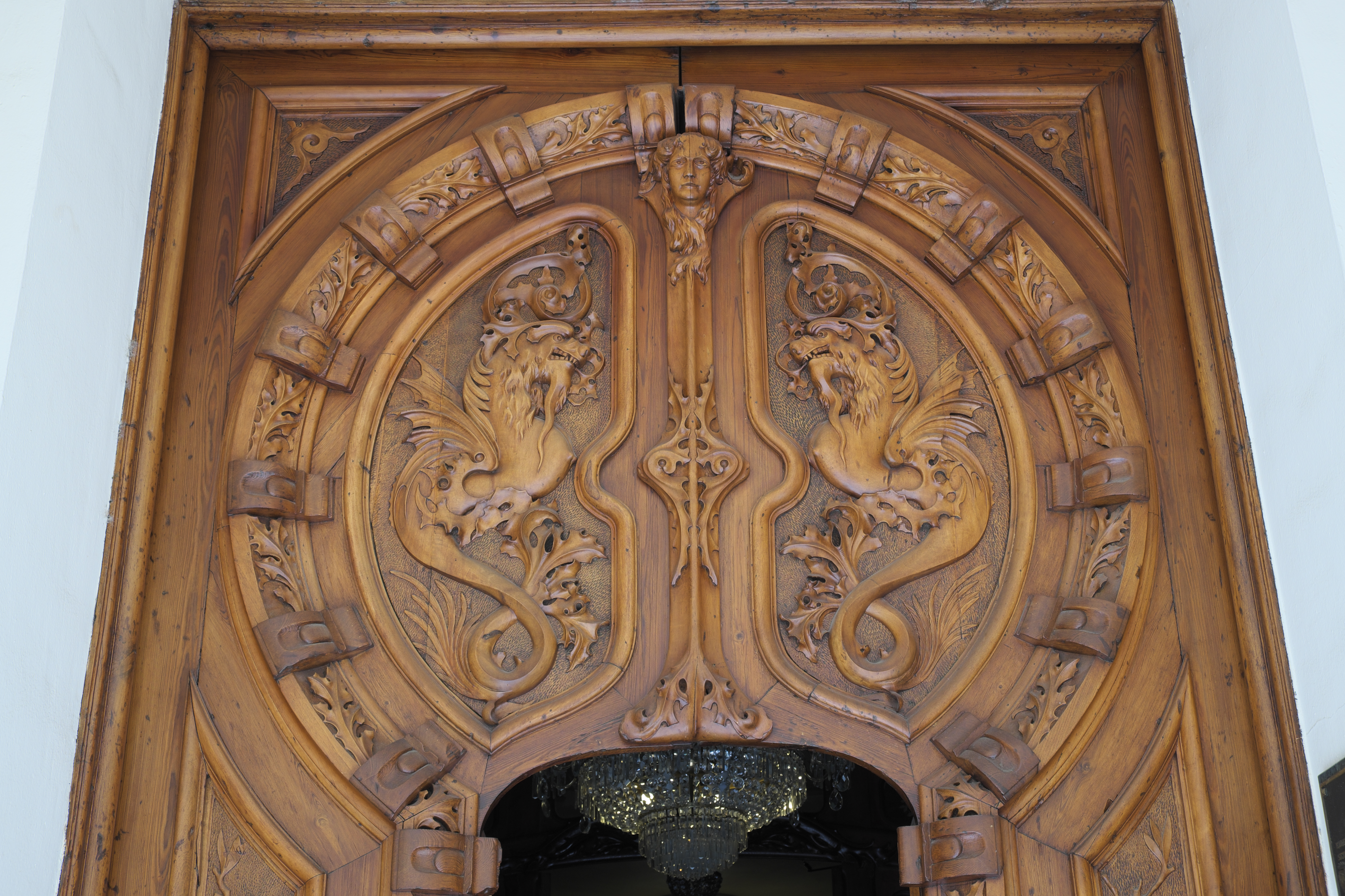 Casino de Huesca, auch Círculo Oscense, in Huesca (Aragón/Spanien), Tür